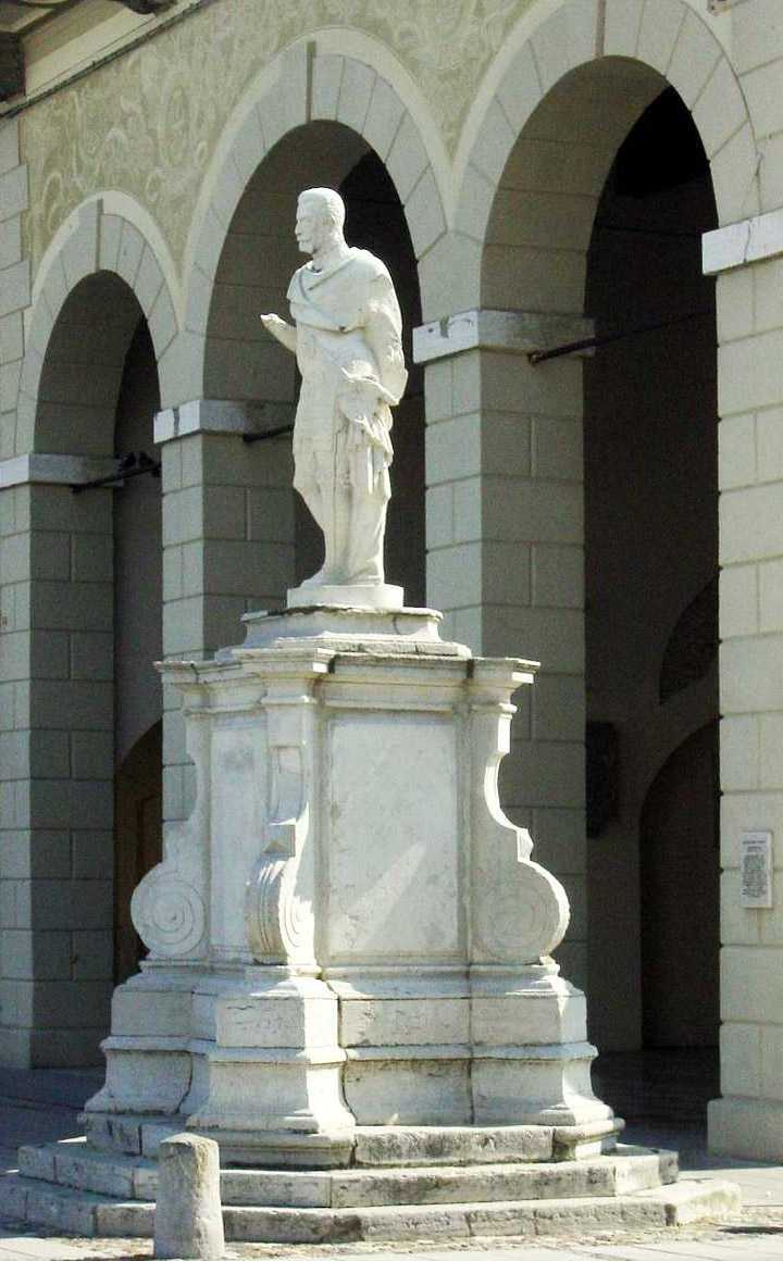 Palmanova: statua di comandante militare, nella piazza centrale. Curves and hue fixed.